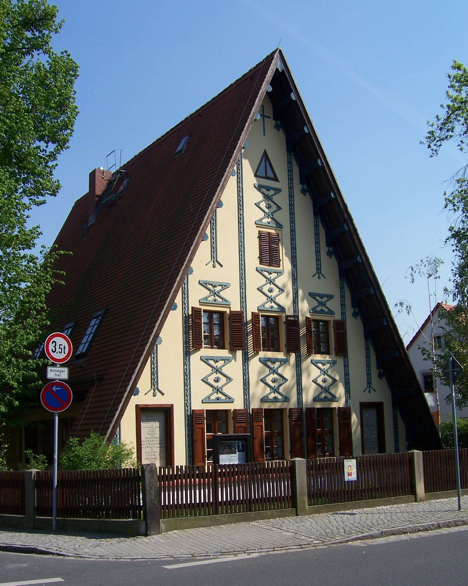 Diné bizaad: Das nach Nikolai Abramowitsch Putjatin benannte Putjatinhaus in Kleinzschachwitz, Meußlitzer Straße 83, in Dresden.